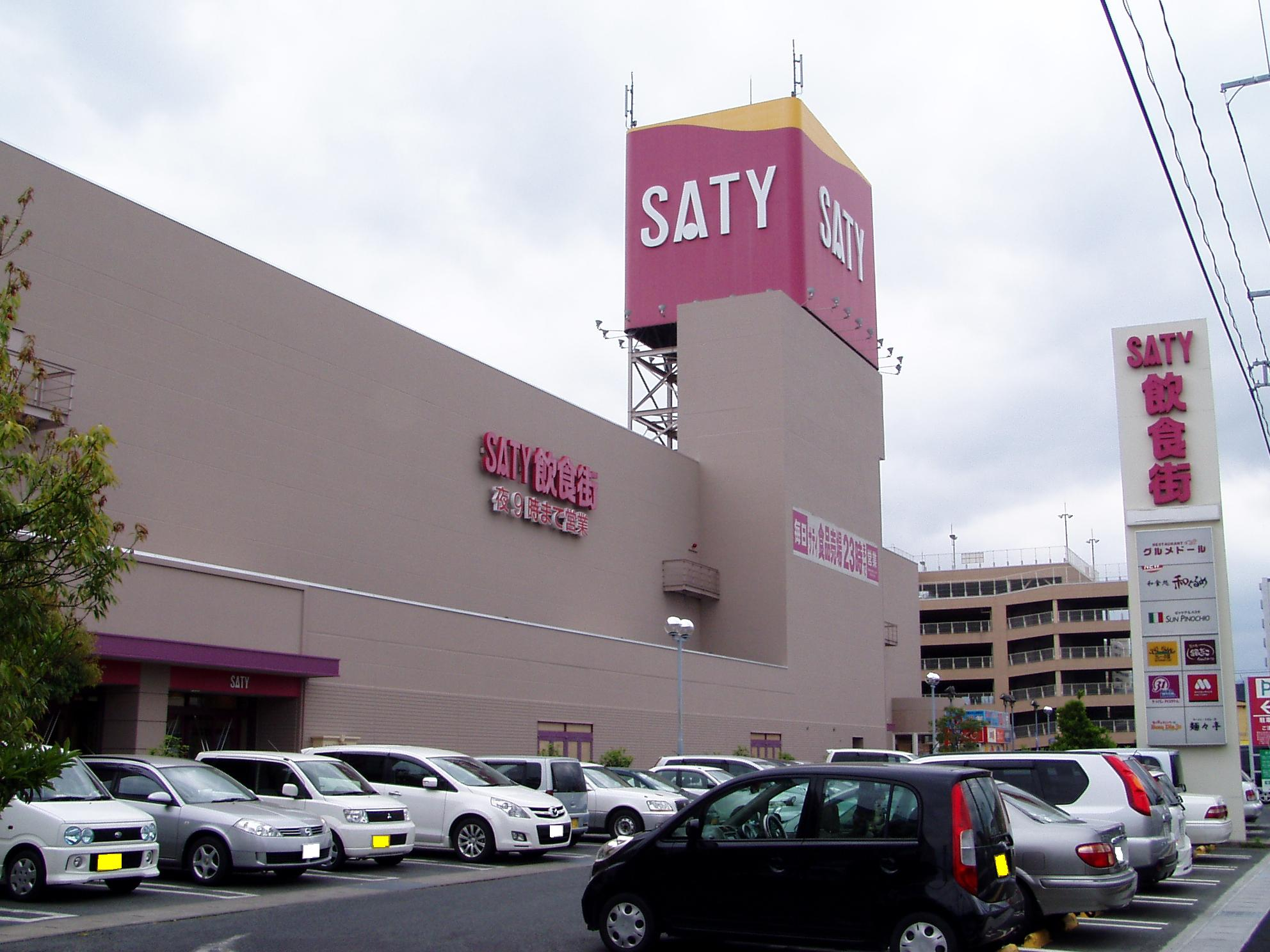 いわきサティの店舗の外観